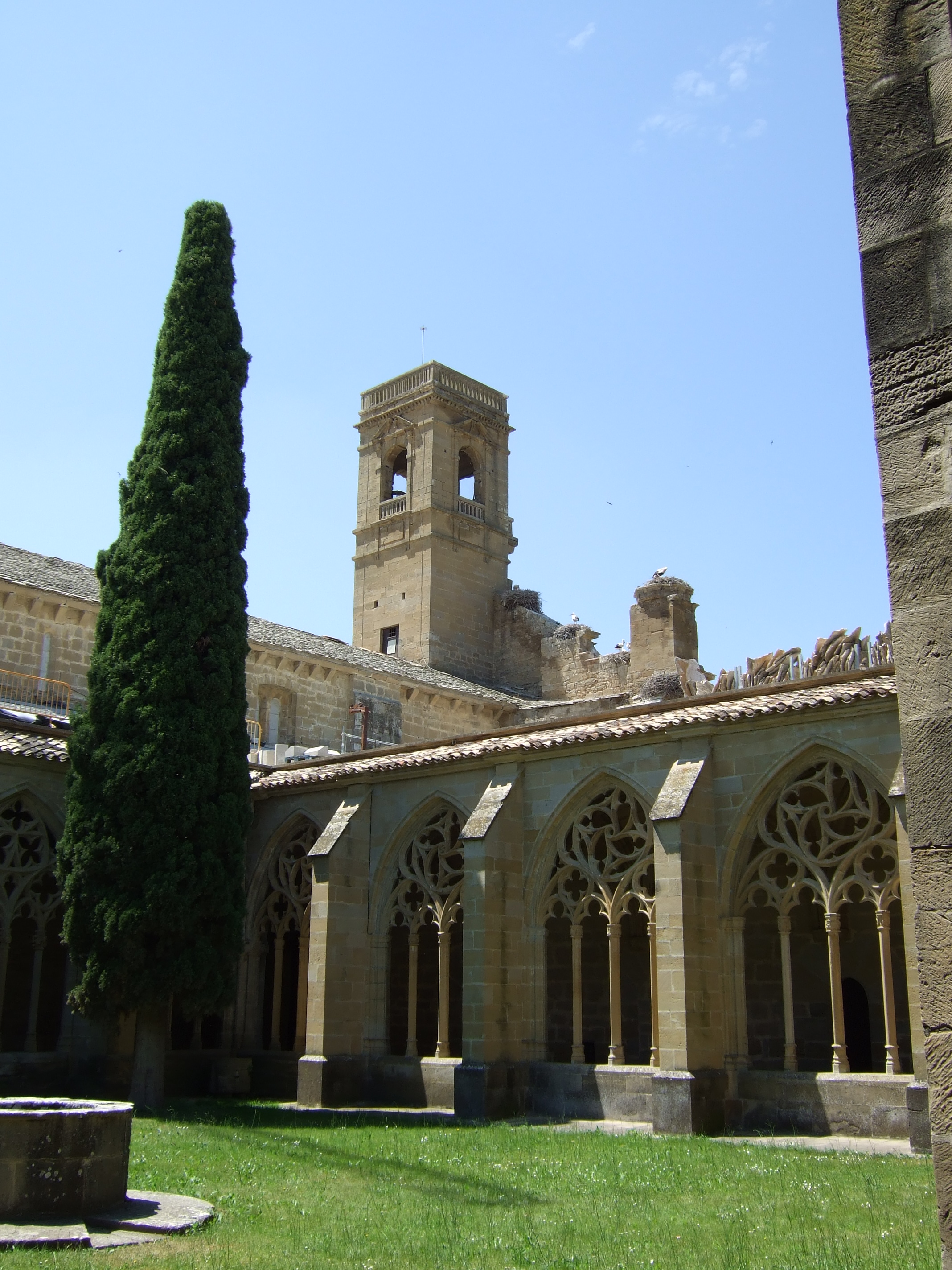 Monasterio de la Oliva. Navarra